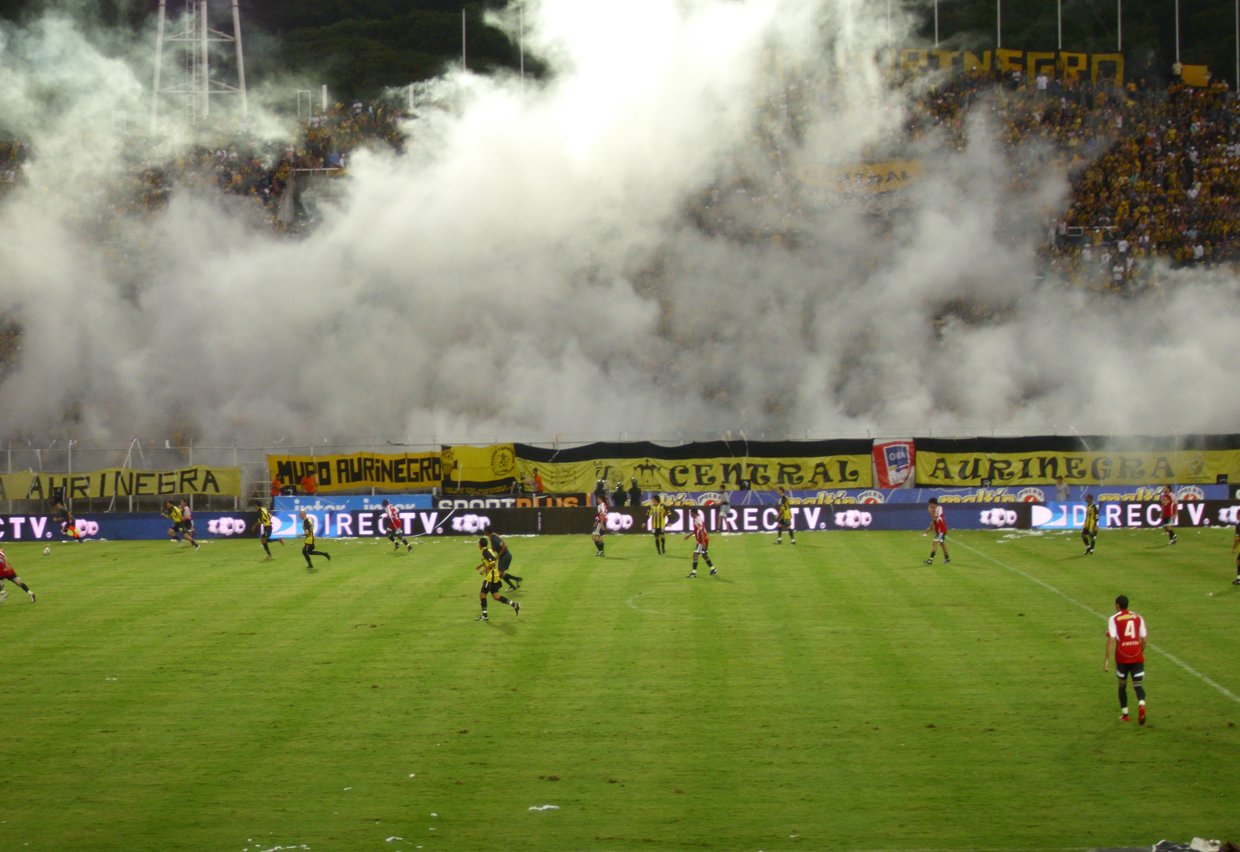 Clásico del fútbol venezolano disputado el 31 de mayo de 2010 en el Polideportivo de Pueblo Nuevo.